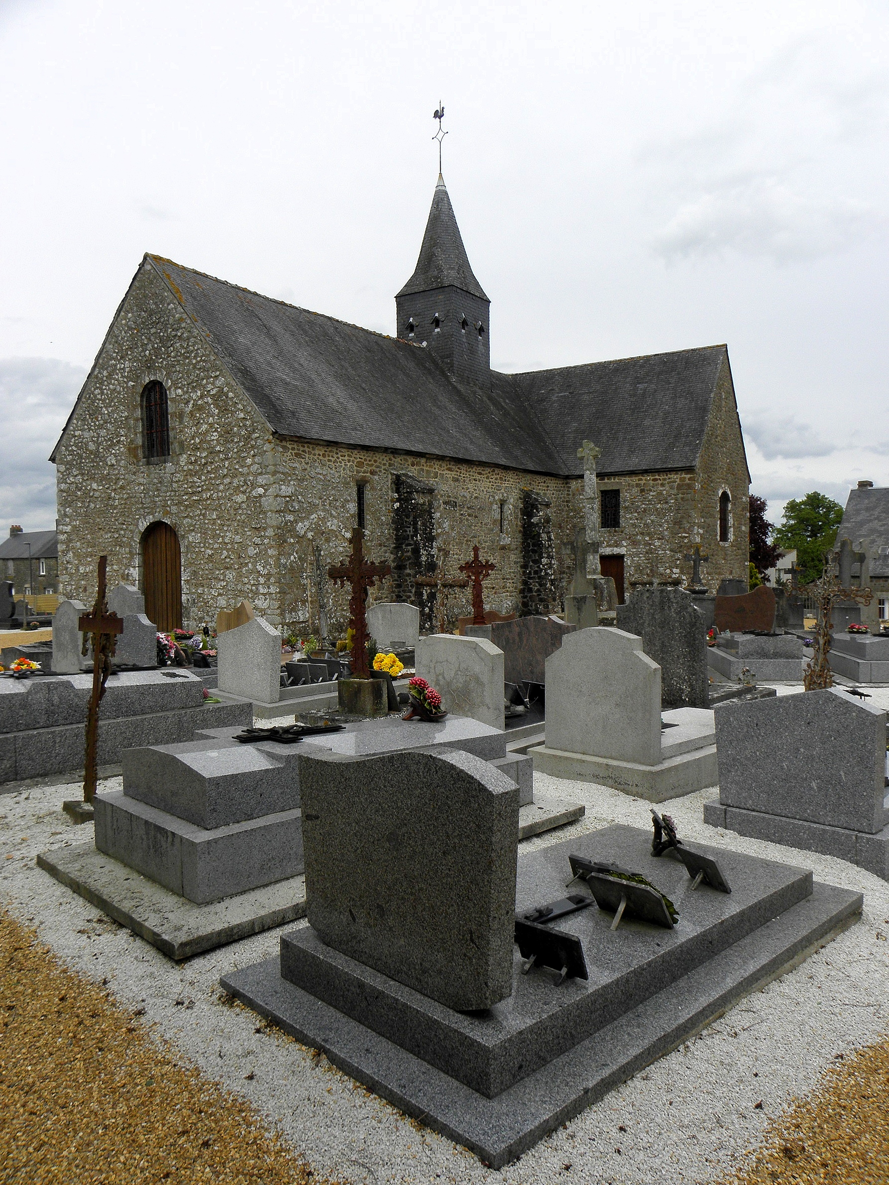 Église Notre-Dame-de-l'Assomption de Soucé (53). Façade occidentale et flanc sud.